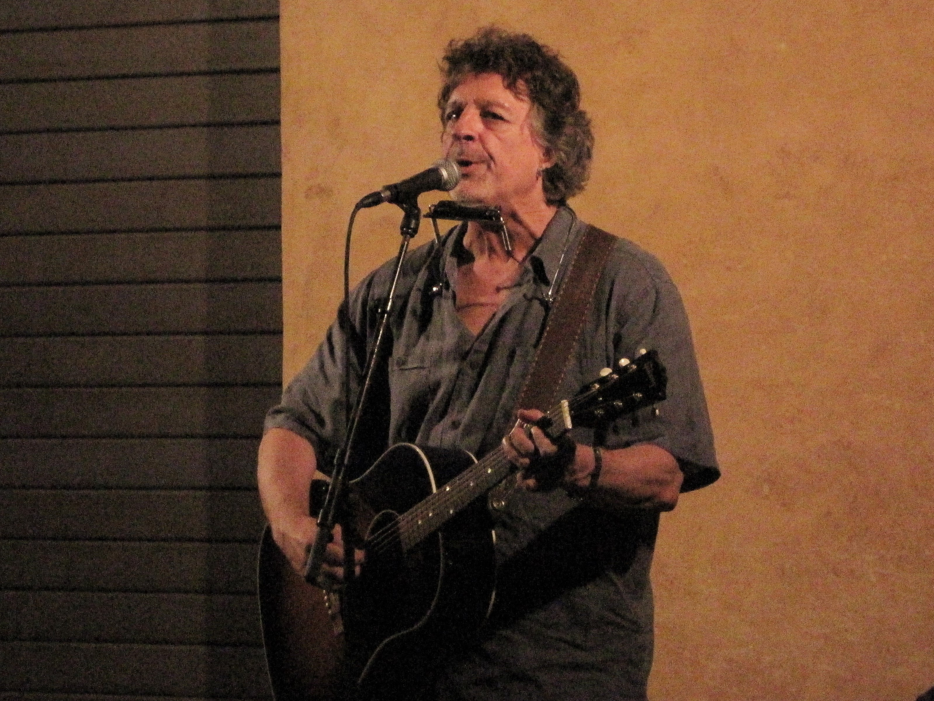 Dirk Hamilton in concerto in piazzetta Municipale a Ferrara nel luglio 2012